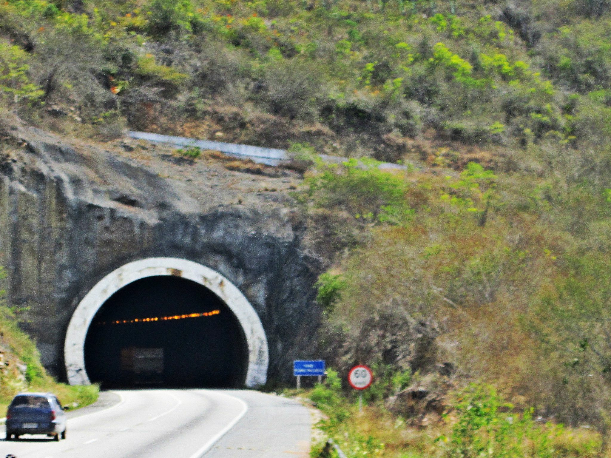 Túnel Cascavel, na BR-232 - Serra das Russas - Gravatá, Pernambuco, Brasil